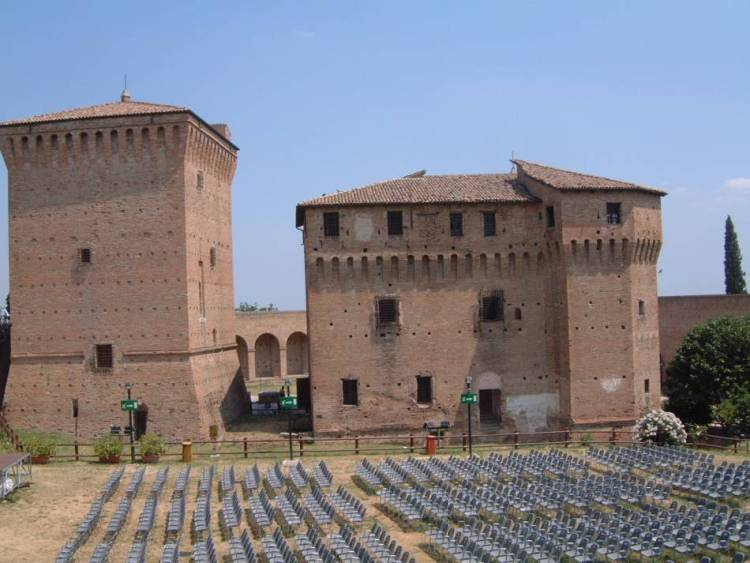 Je suis l'auteur de cette photo prise à cesena en 2005